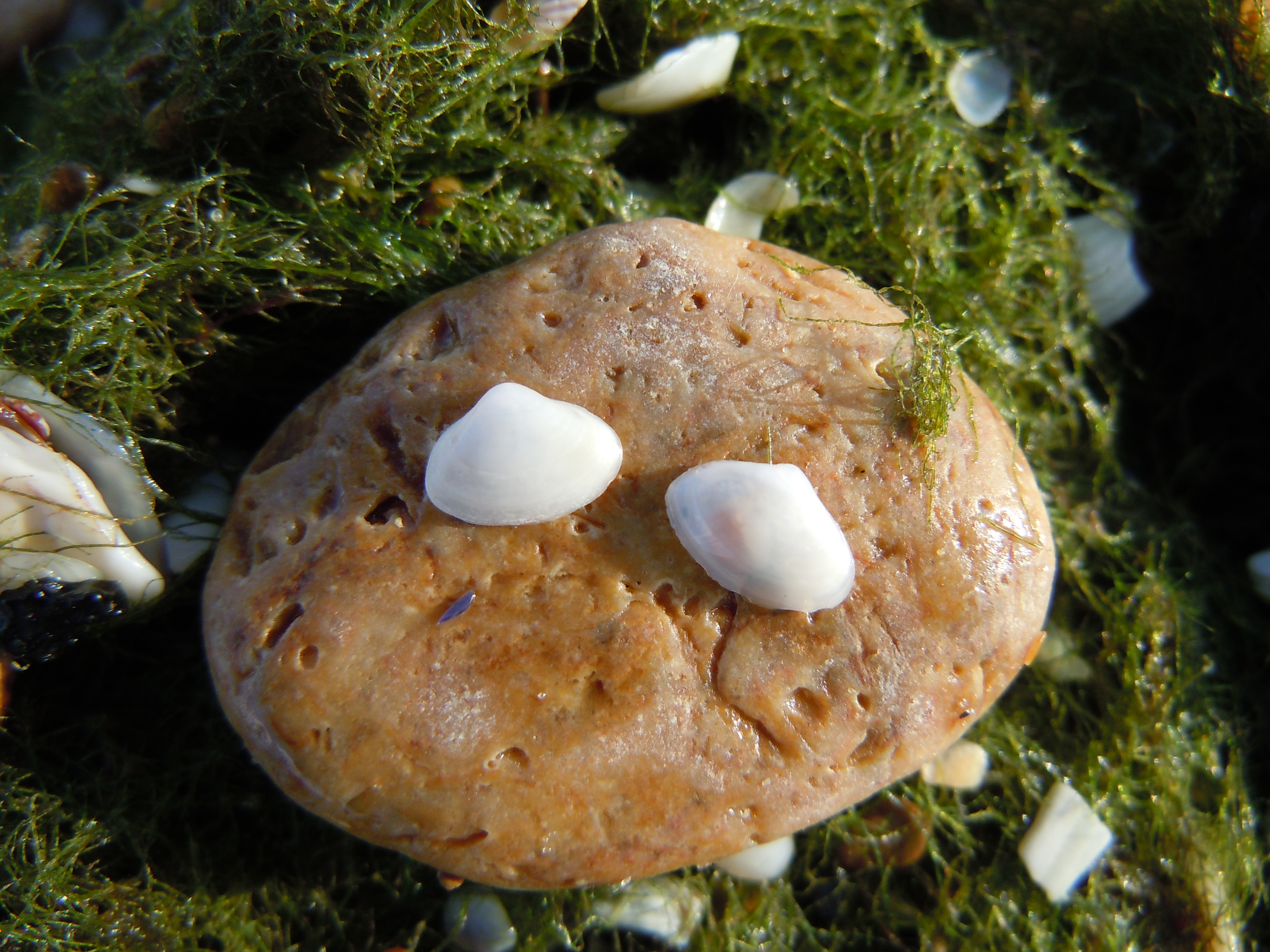 Мушлі Lentidium mediterraneum на березі Одеської затоки, пляж Лузанівка